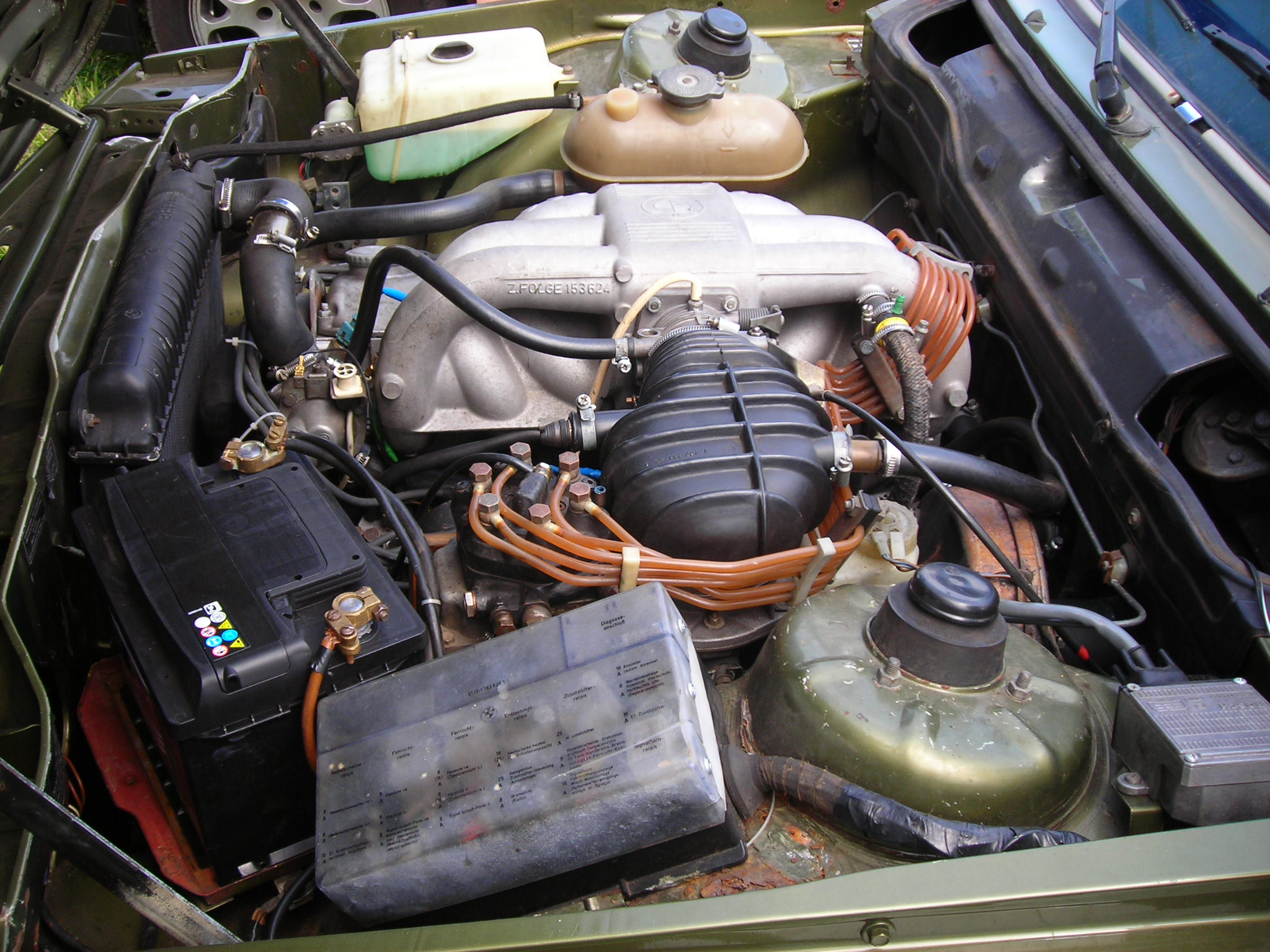 BMW 323 M20B23